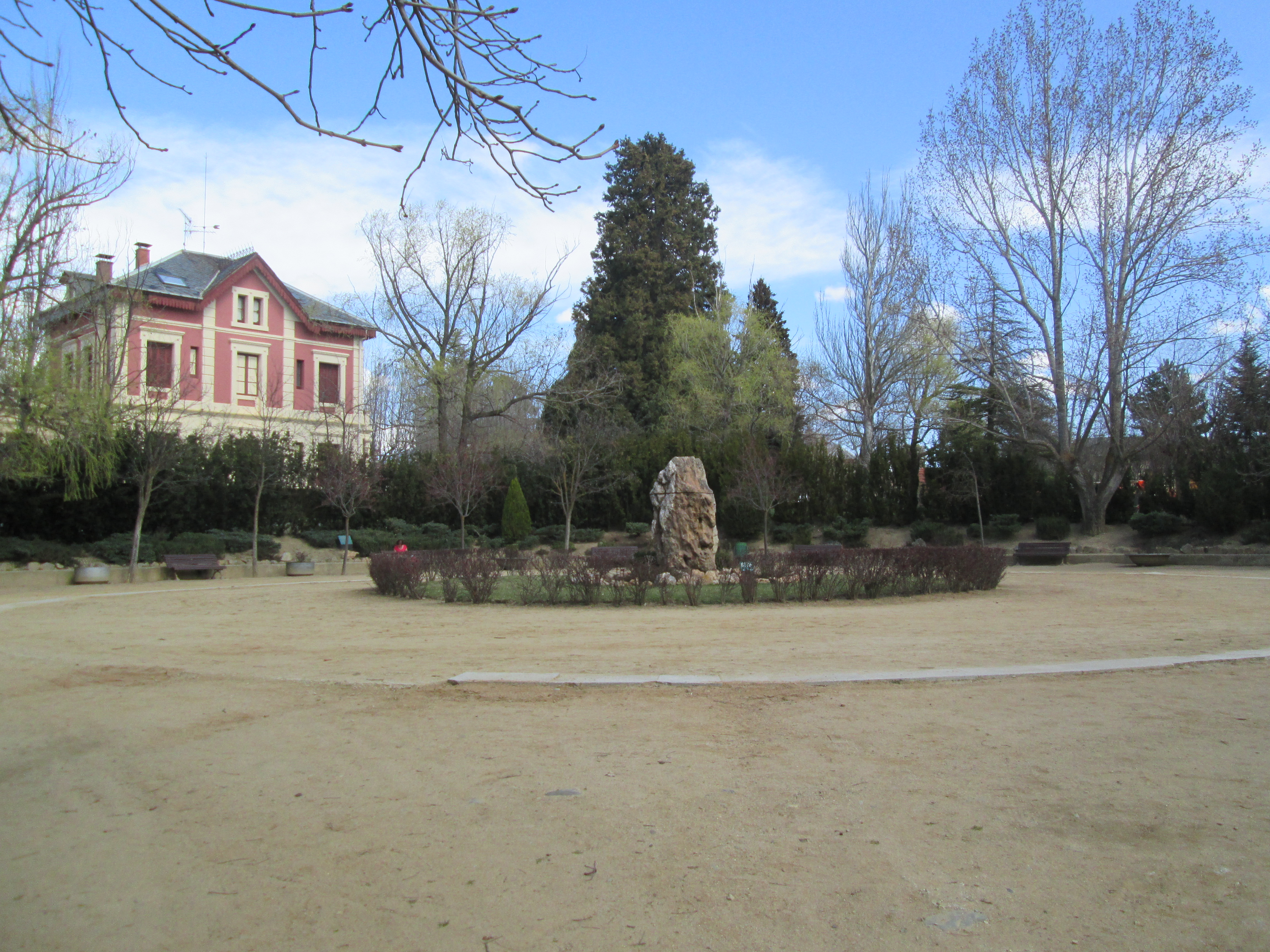 llac març 2014